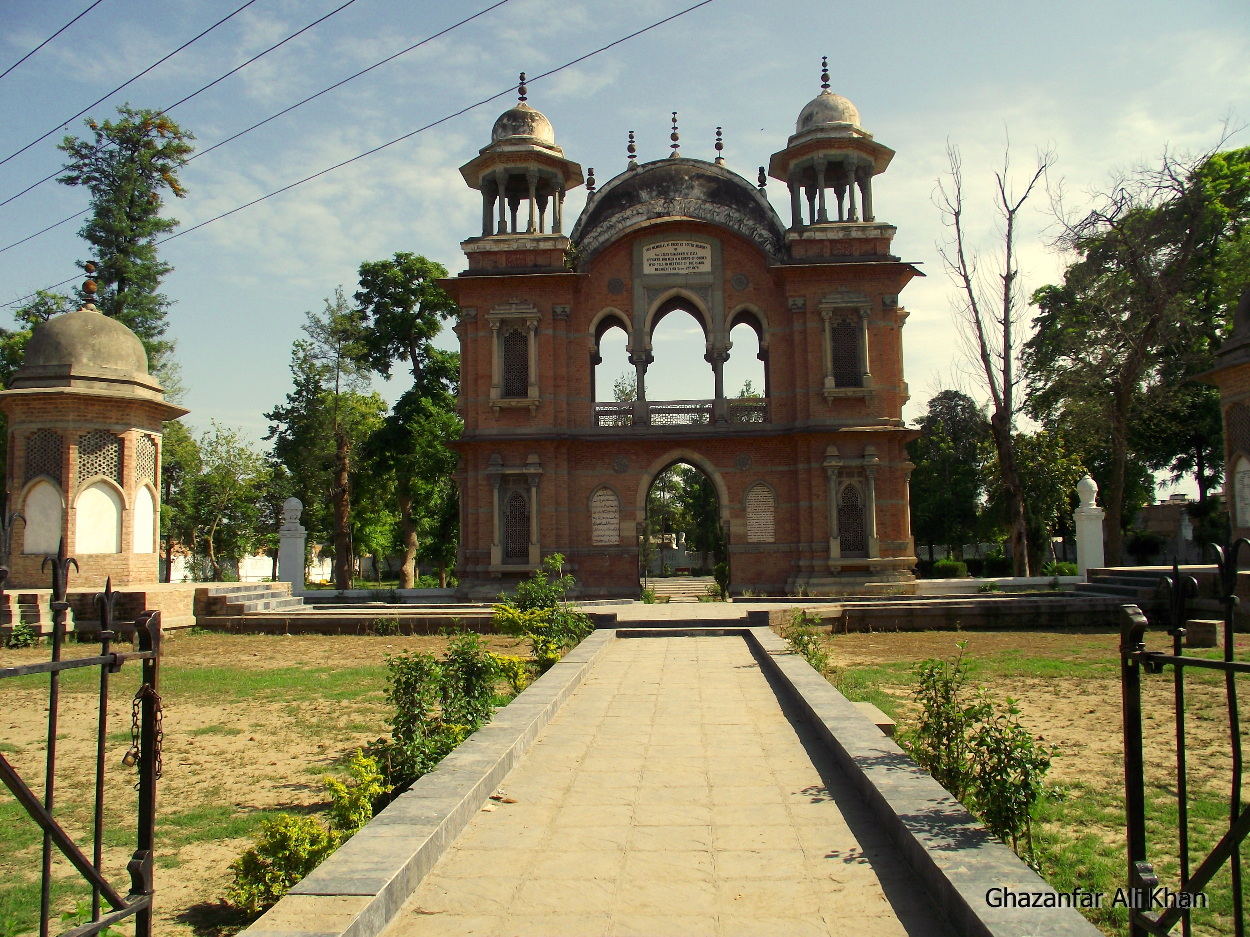 Guides Memorial, Mardan